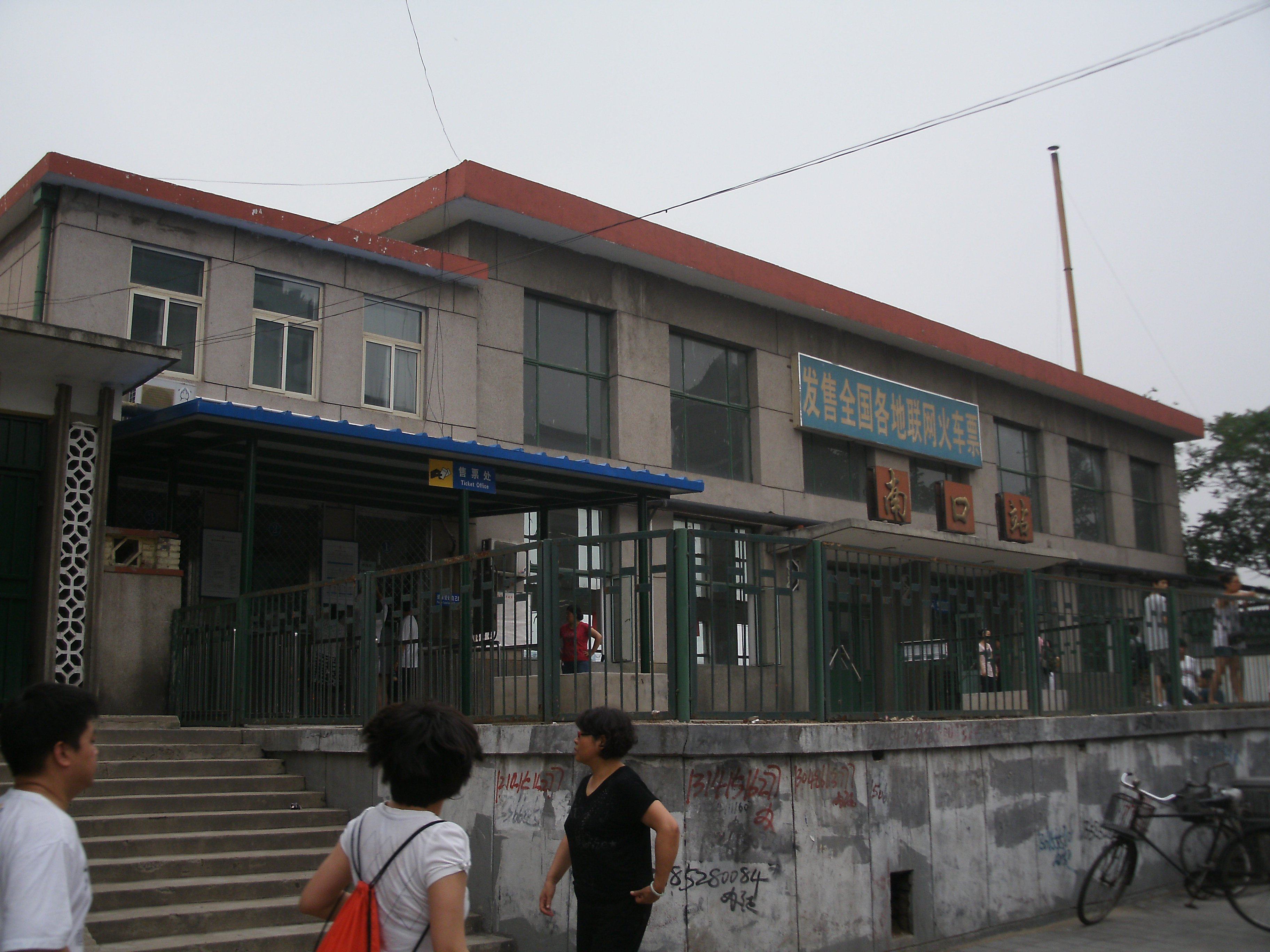 南口站现用站房外侧